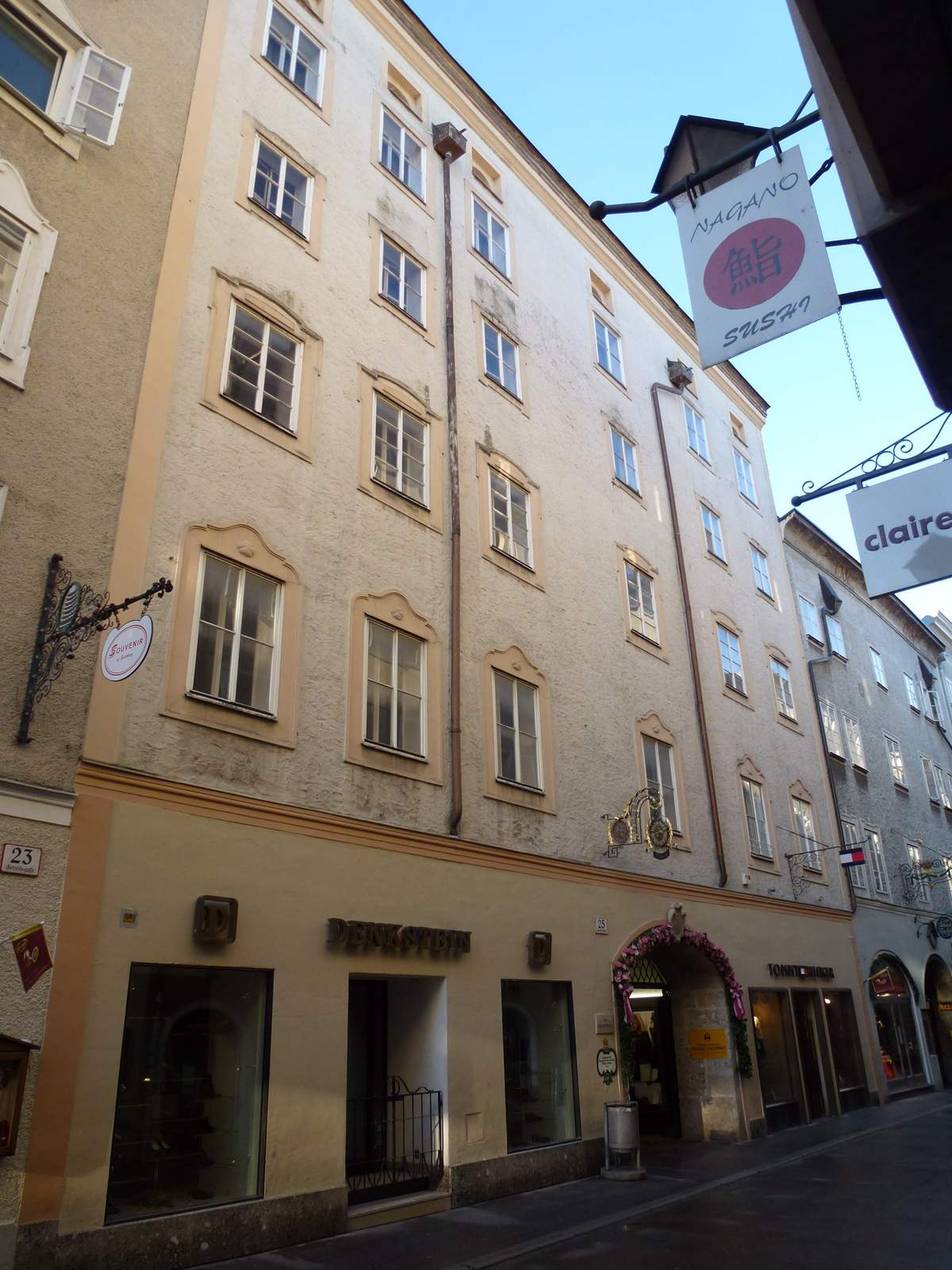 Bürgerhaus, Nußdorfer- oder Schwabenhaus